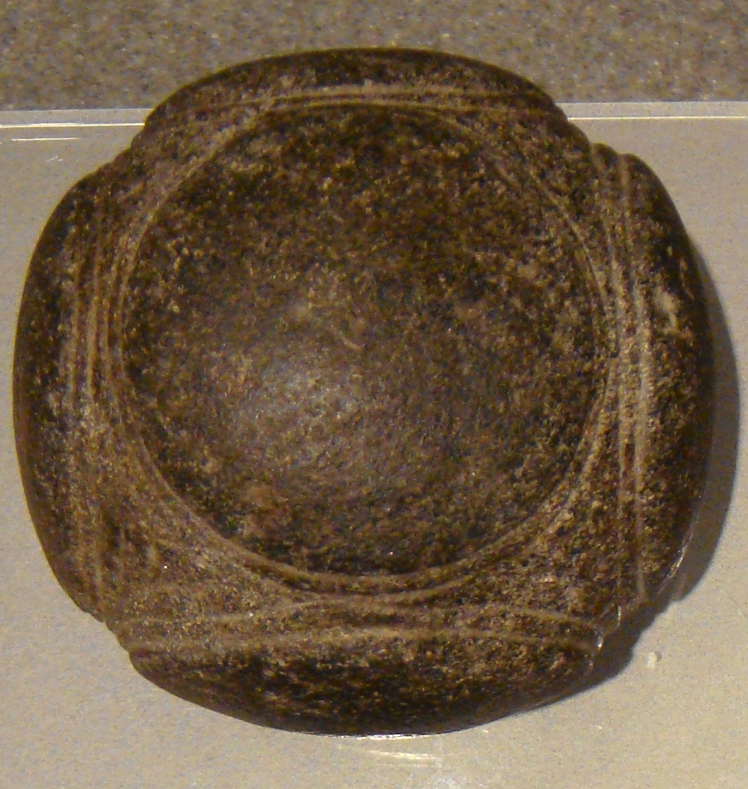 Kelvingrove Art Gallery and Museum de Glasgow. Salas de Prehistoria humana.